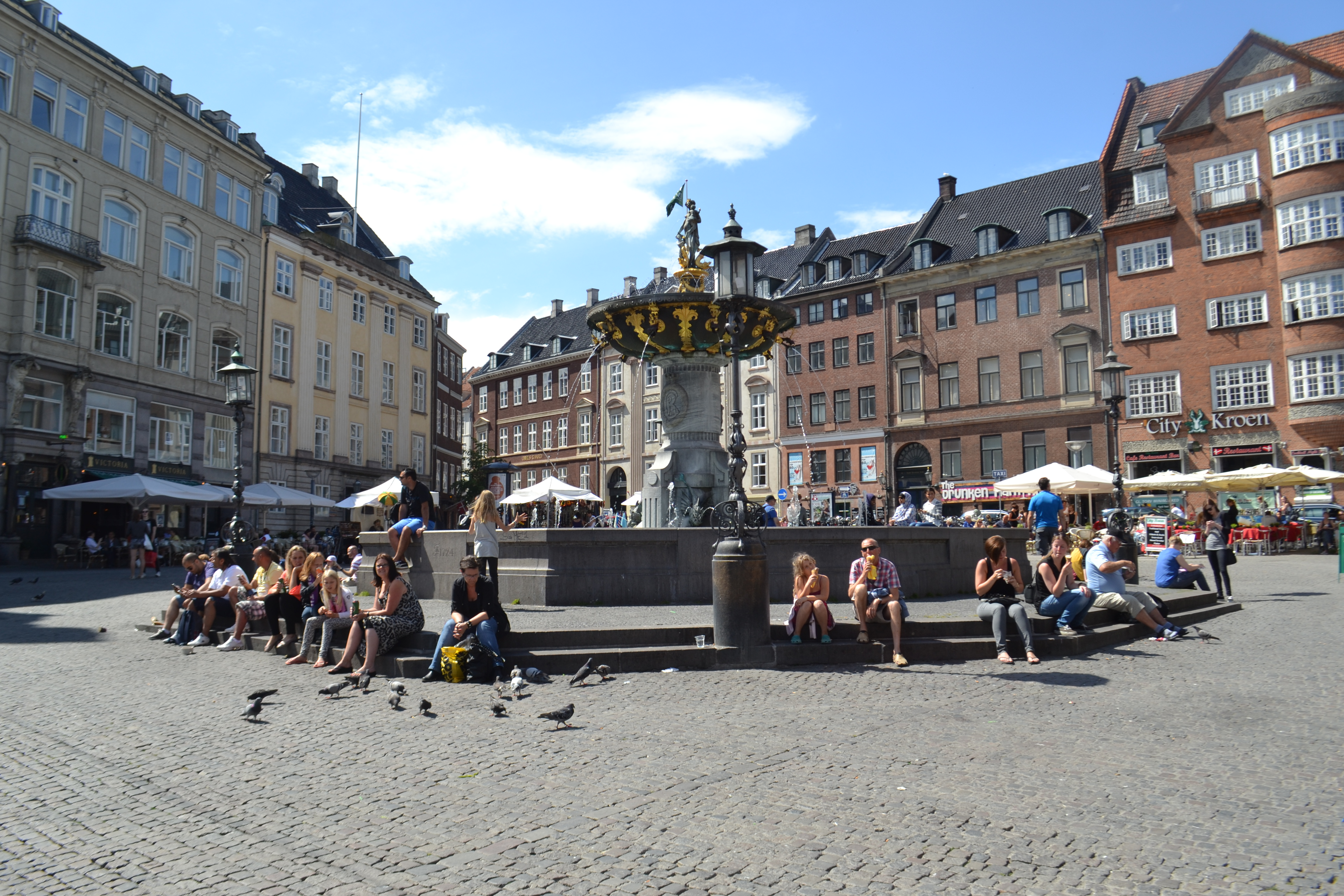 Gammeltorv, Copenbhagen, Denmark